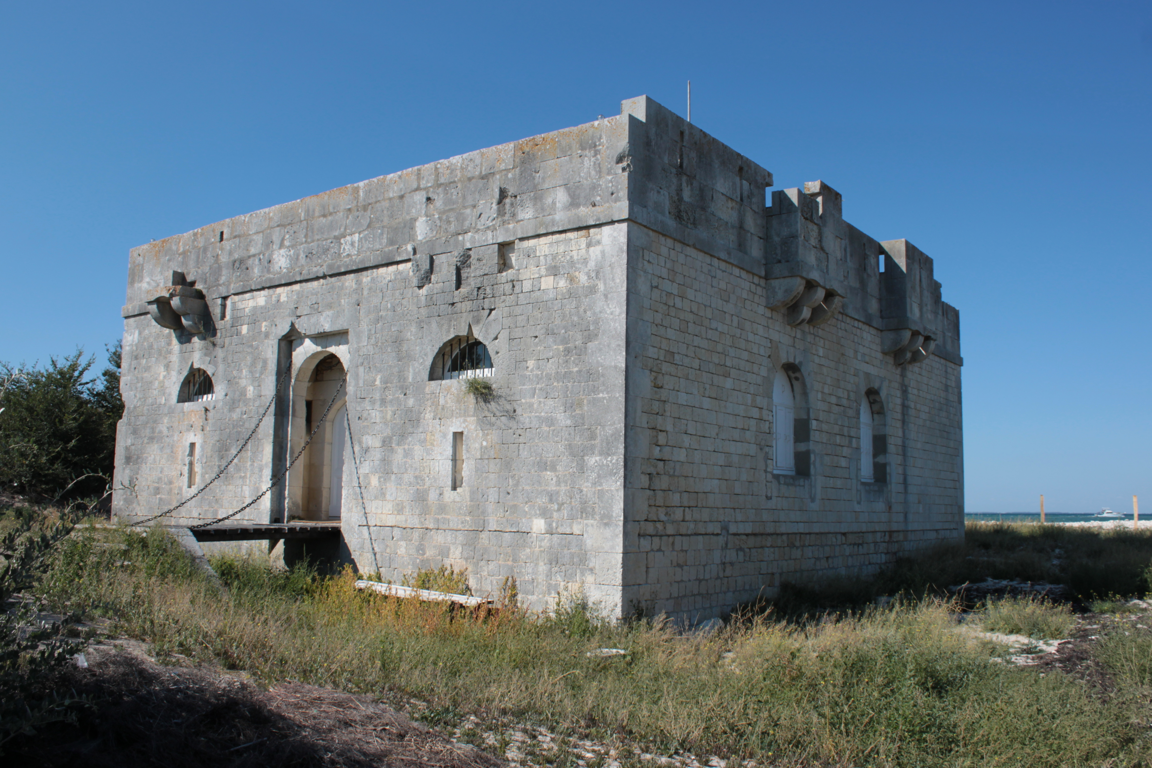 Fort du Grouin, Fr-17-Loix.